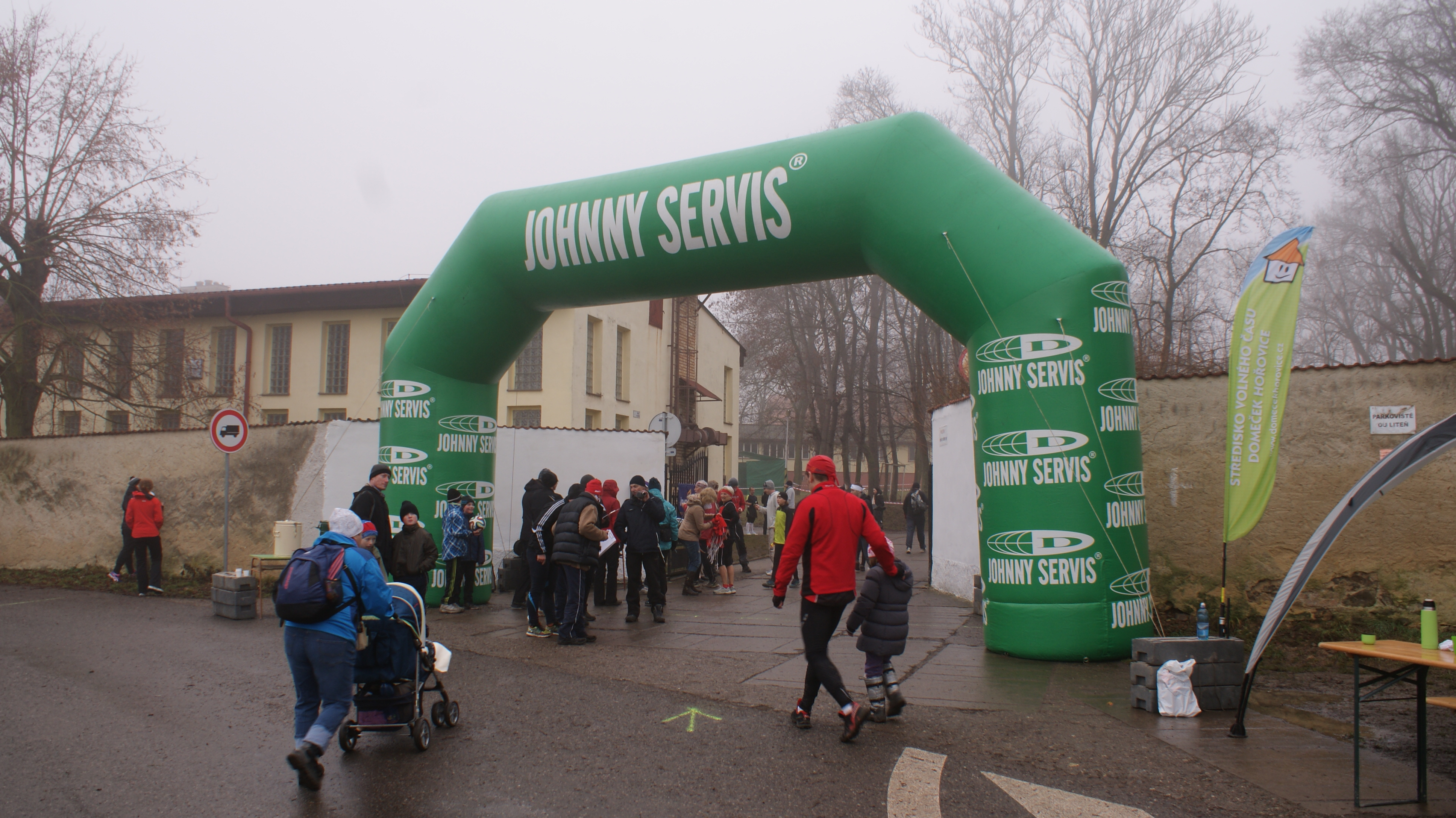 Zimní běh Litní - u cíle 18. 1. 2014